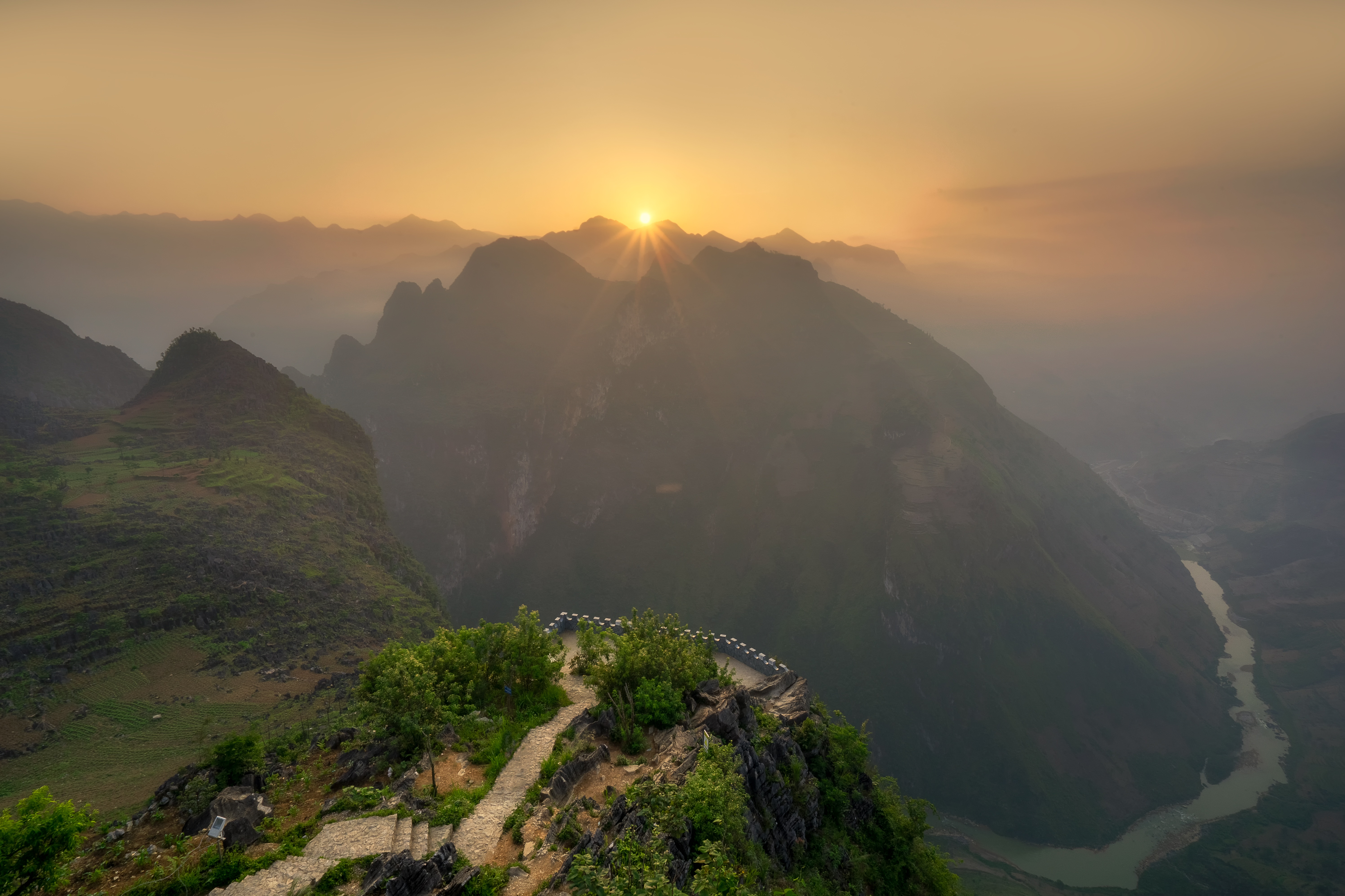 Mã Pí Lèng